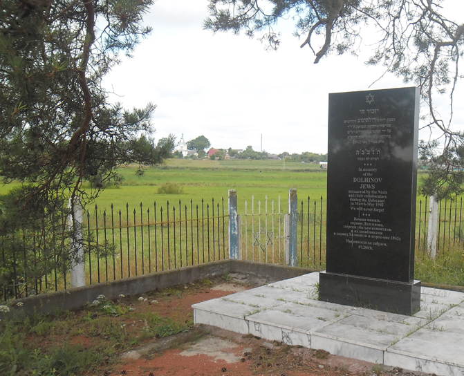 На месцы помніка ахвярам Халакоста на Міколу ў 1943 годзе немцы спалілі дзесяткі габрэяў у хлеве. Дабраахвотна загінуў разам з сынам і жонкай і старшыня юдэнрада Нёмка Рыер. Немцам чымусці спрыялі таму, каб ён з сям’ёй збег куды-небудзь, але Нёмка са словамі “Богам велена” пайшоў у агонь.